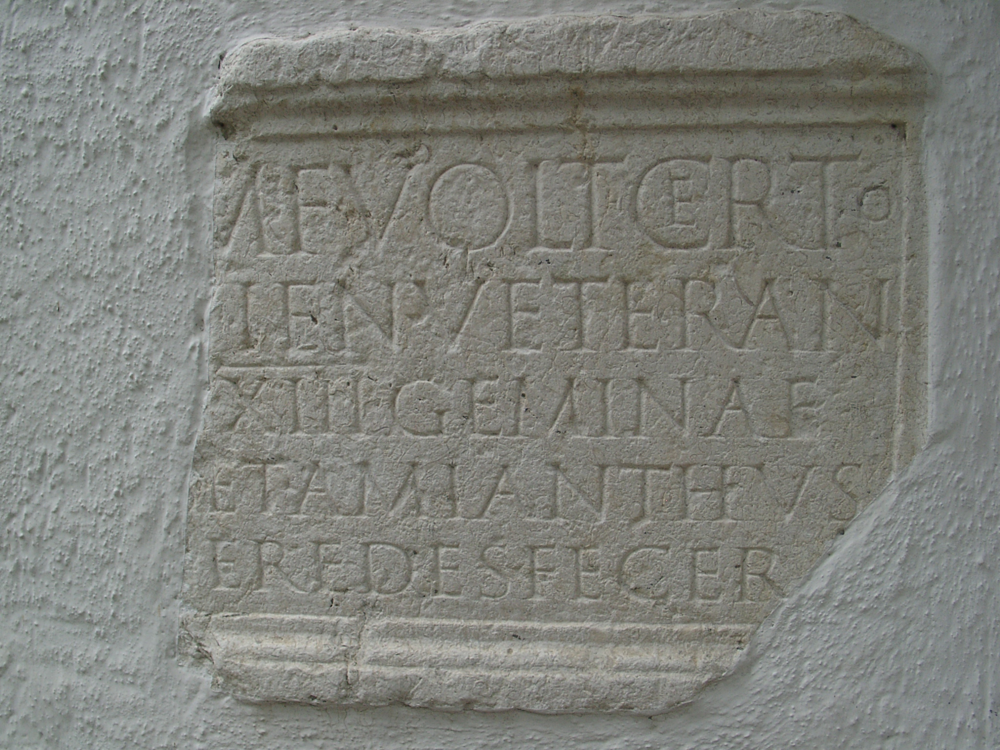 Zurzach, römische Inschrift aus dem antiken Tenedo. CIL XIII, 05239